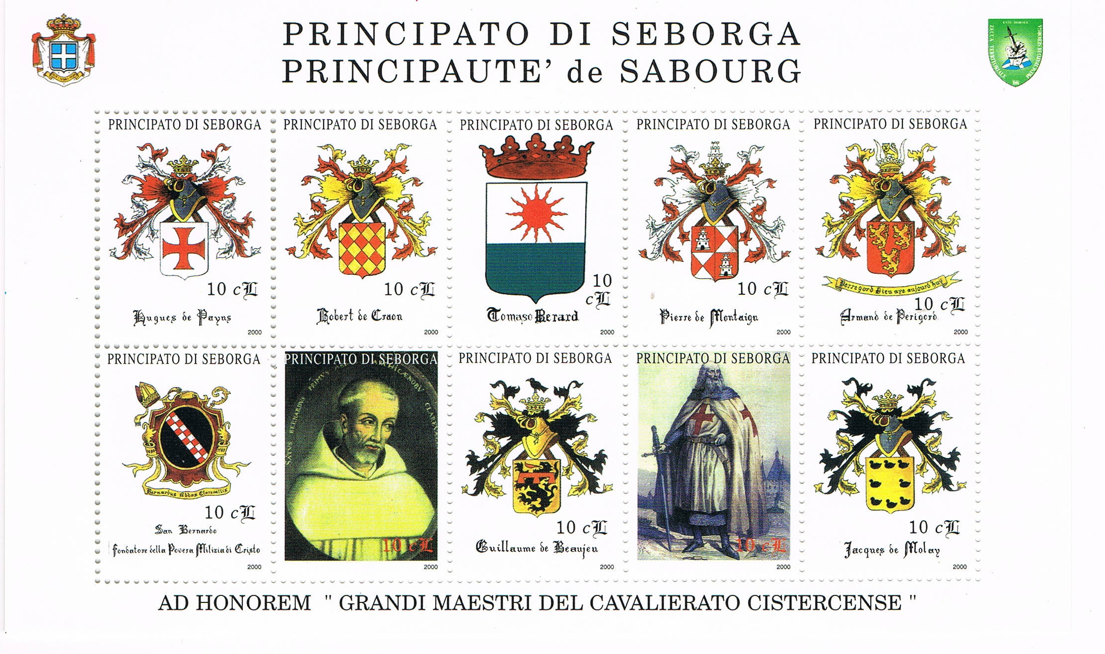 Principato di Seborga - Foglietto di francobolli